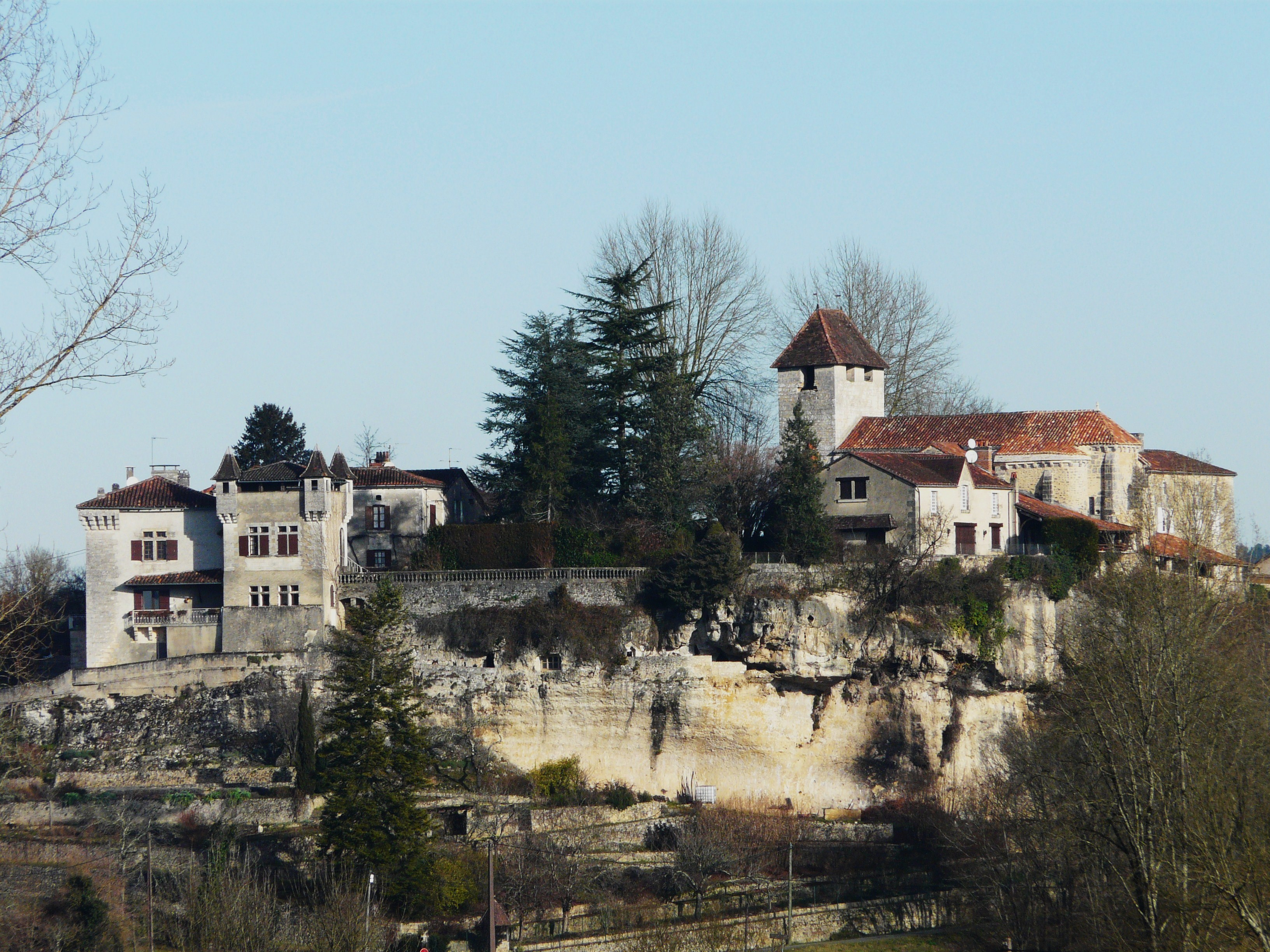 Le bourg de Condat-sur-Trincou avec son château et son église, Dordogne, France